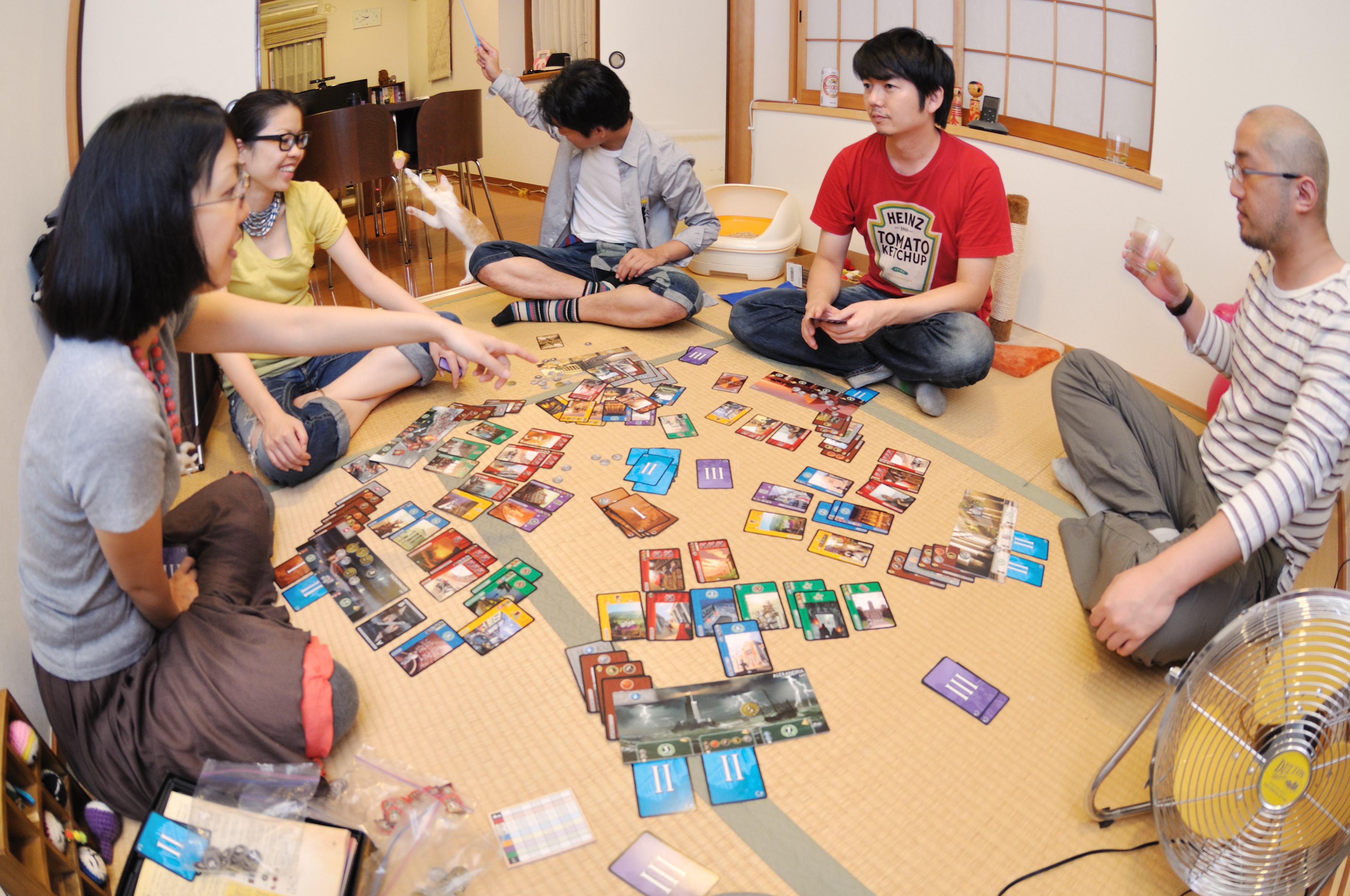 Une partie du jeu de société 7wonders